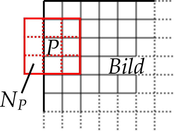 Randproblem mit einer Nachbarschaft in einem Bild marginal-problem with a neighbourhood in an image